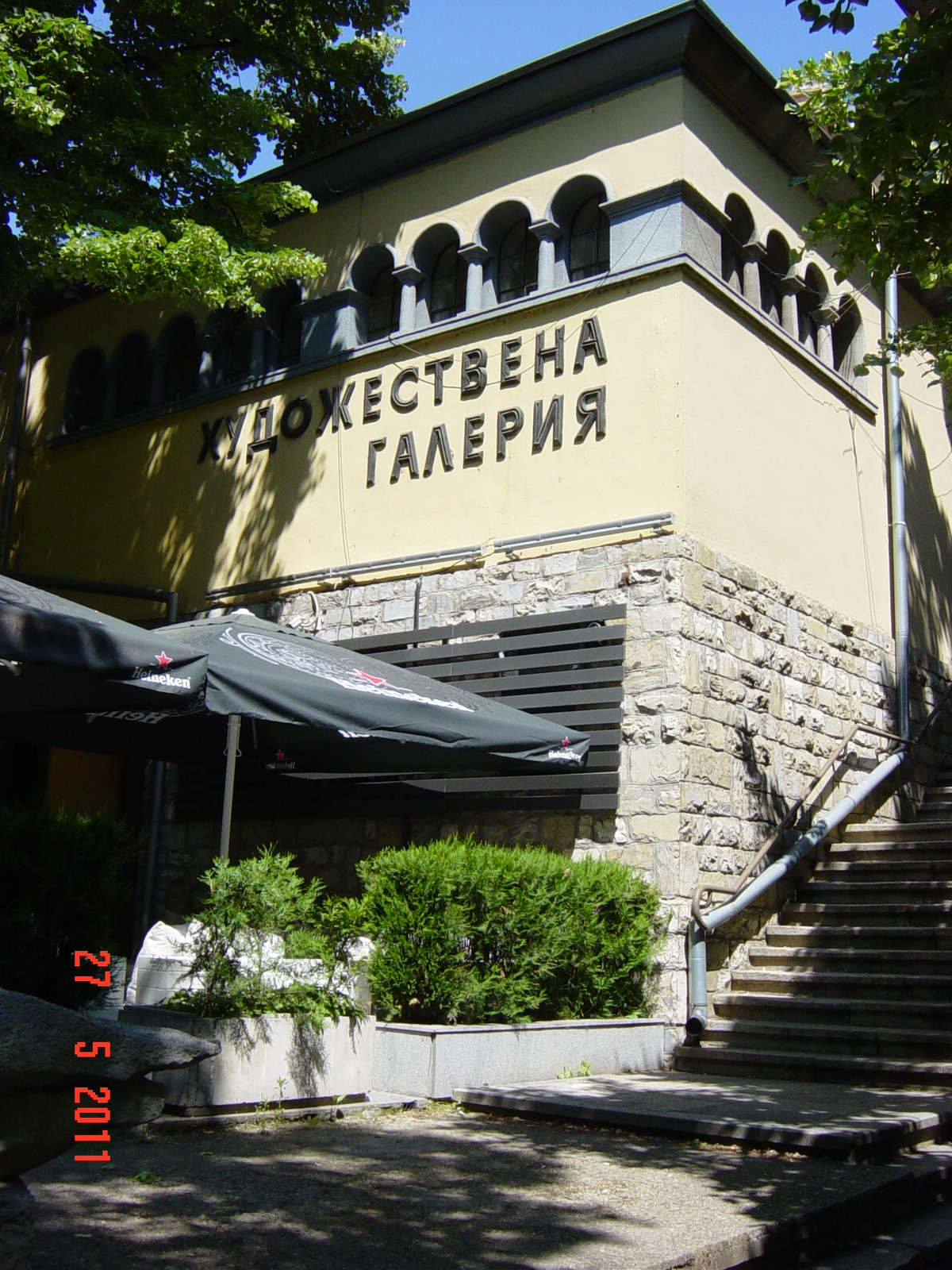 Стара Загора